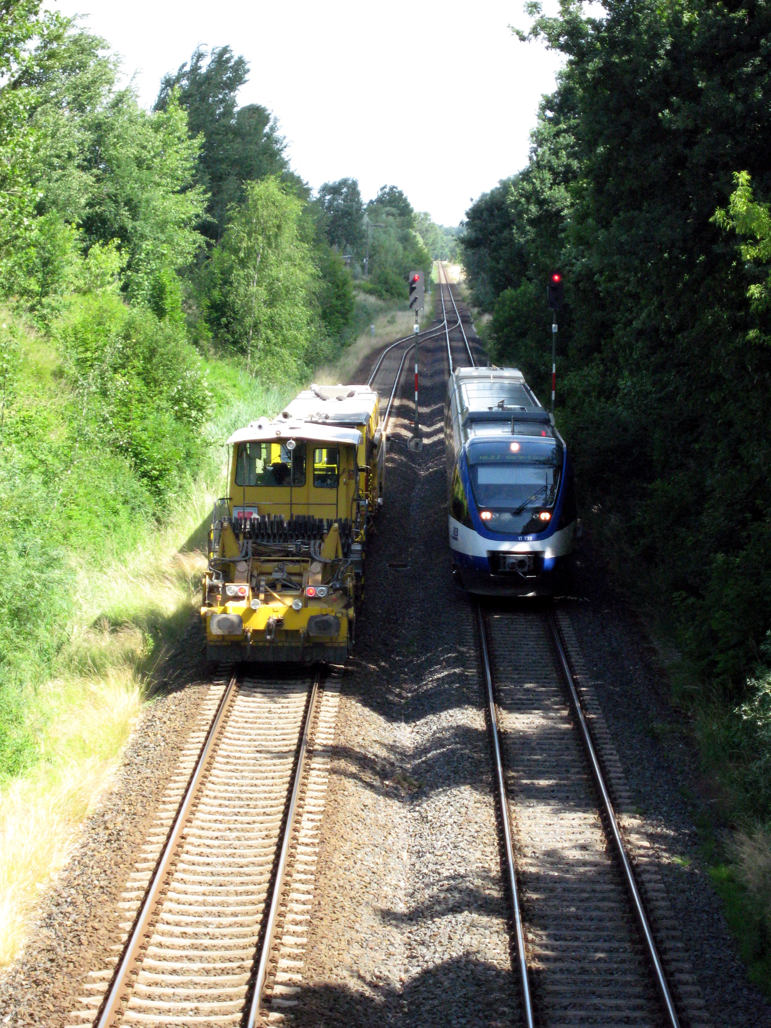 Streckenabschnitt der Niederbarnimer Eisenbahn in Schönerlinde (Richtung Schönwalde), Gemeinde Wandlitz, Landkreis Barnim, Land Brandenburg, Deutschland